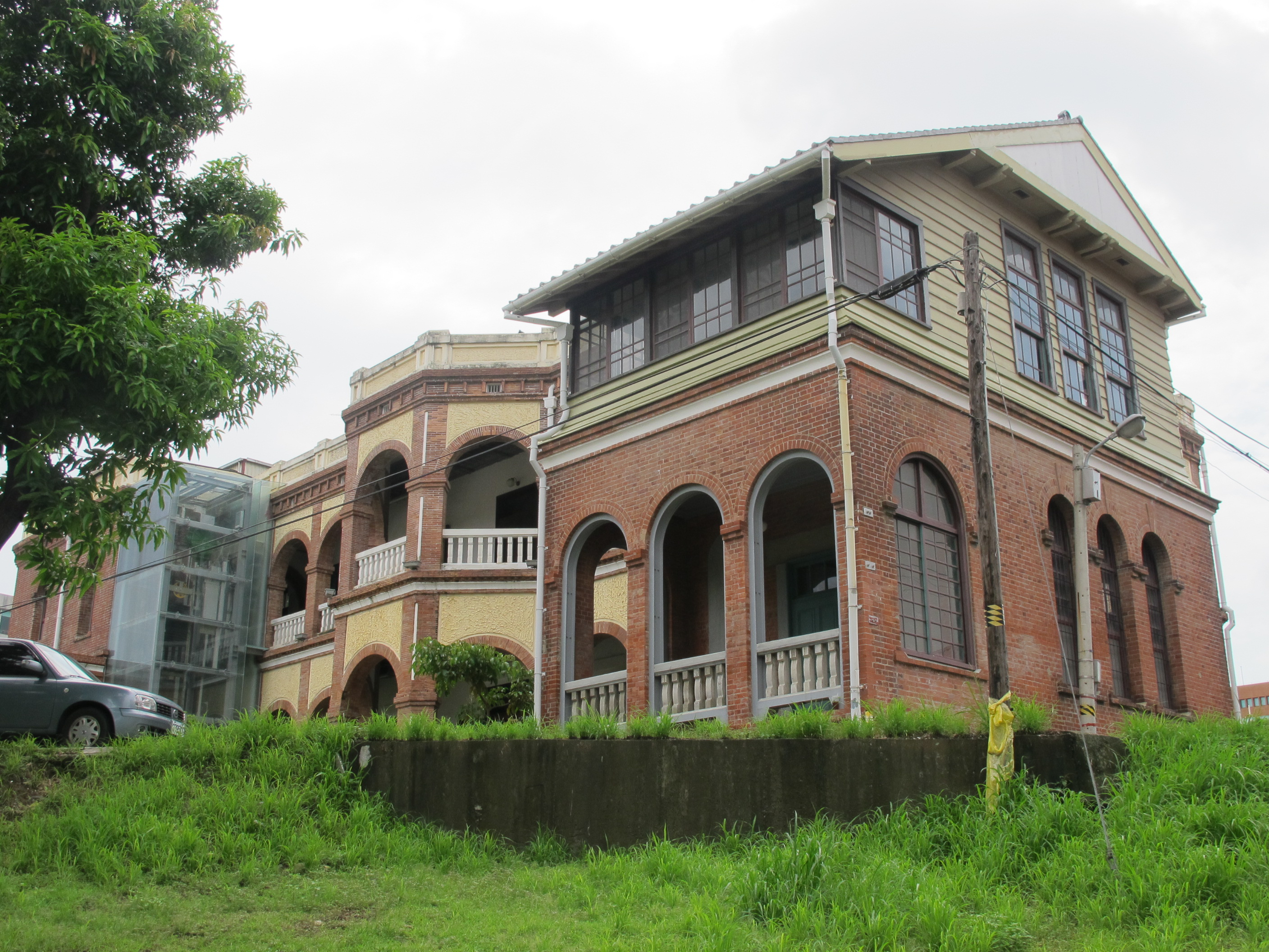 原台南州知事官邸 後面